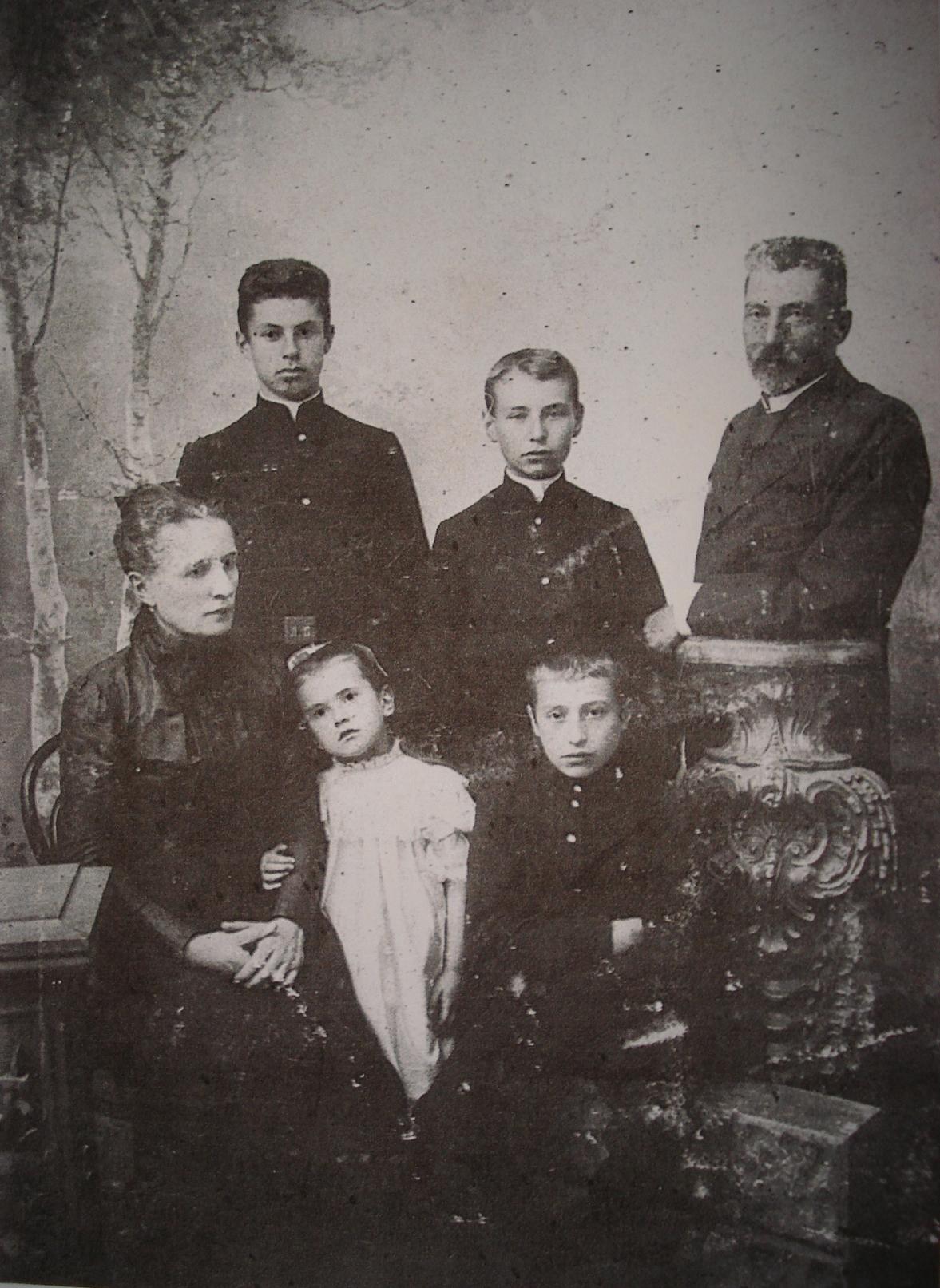 Файл наданий Затурцівським меморіальним музеєм В'ячеслава Липинського